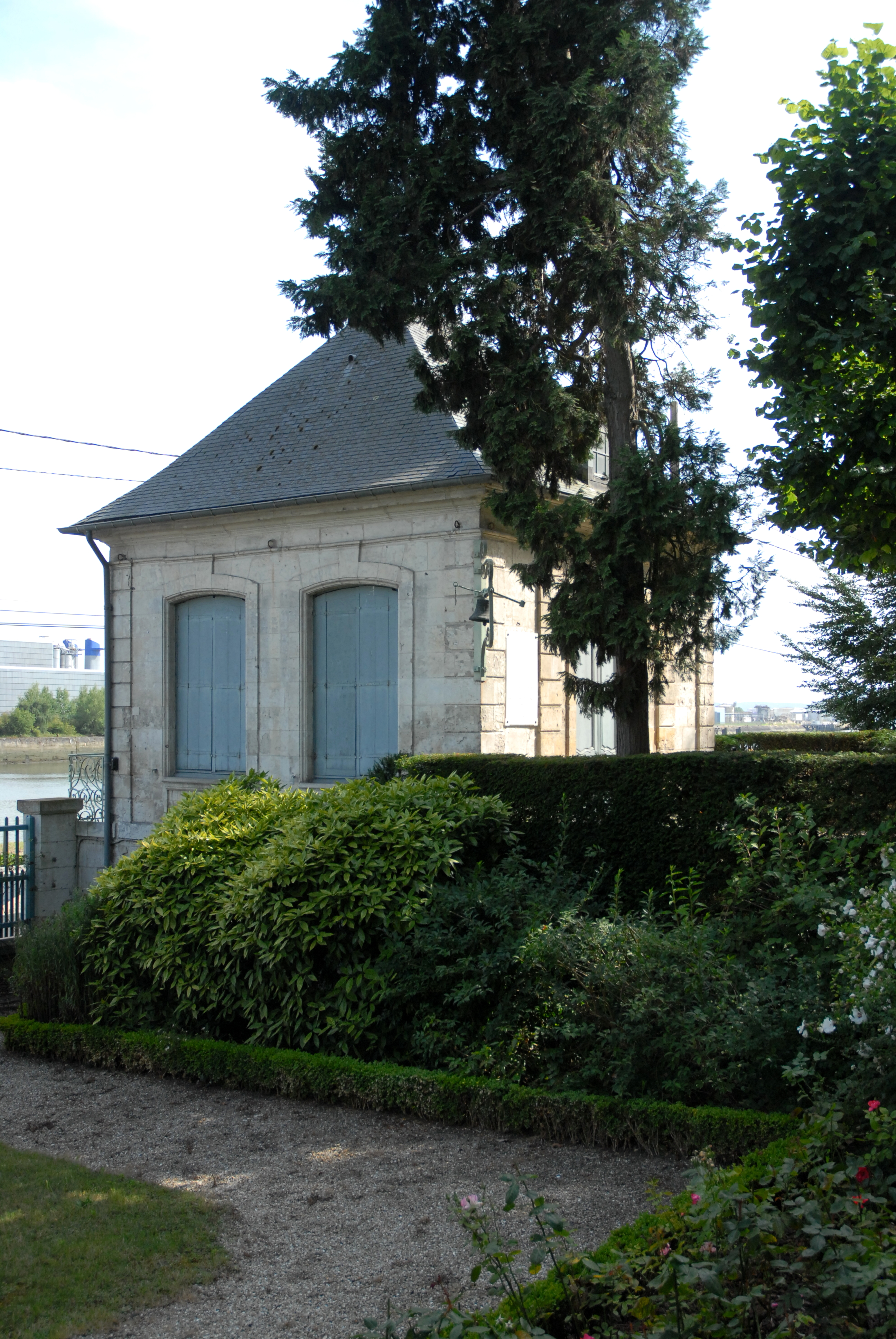 Pavillon Flaubert et son jardin à Croisset, près de Rouen.